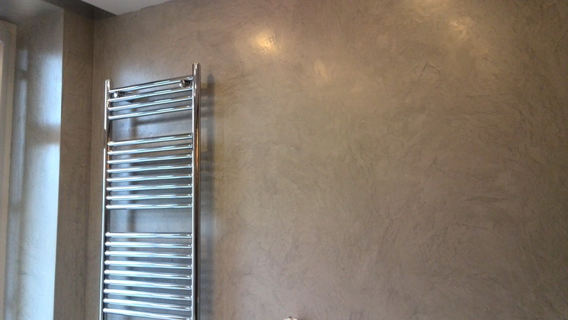 гладкий микроцемент